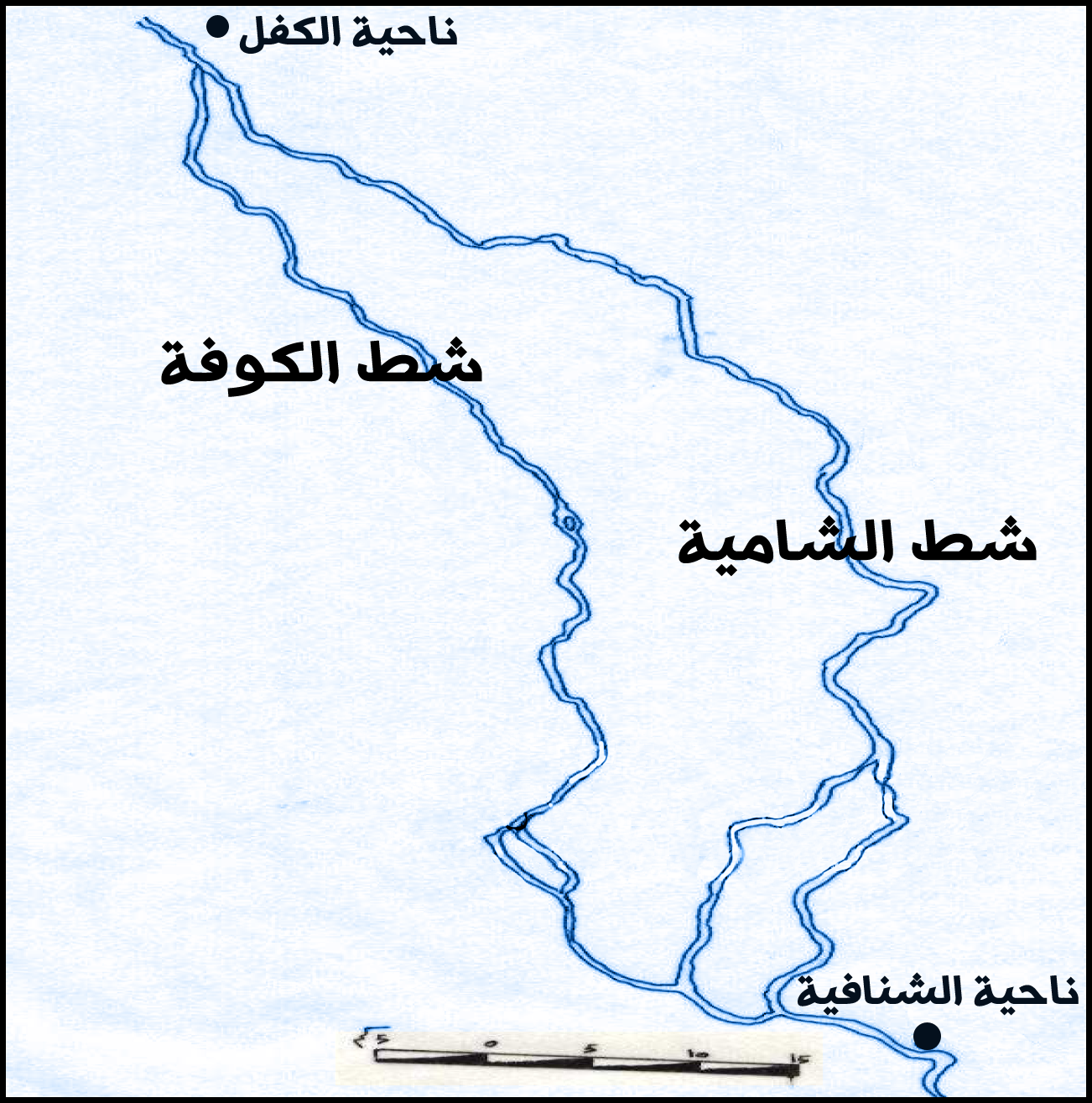 خارطة مجرى شط الشامية